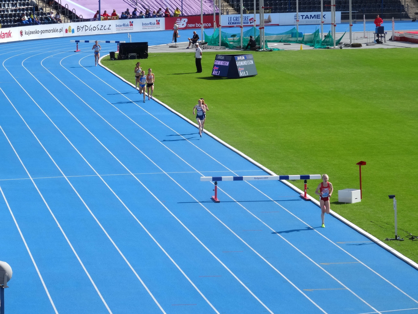 Młodzieżowe Mistrzostwa Europy w Lekkoatletyce U23 w Bydgoszczy 13-16 lipca 2017, biegu na 3000 m z przeszkodami kobiet